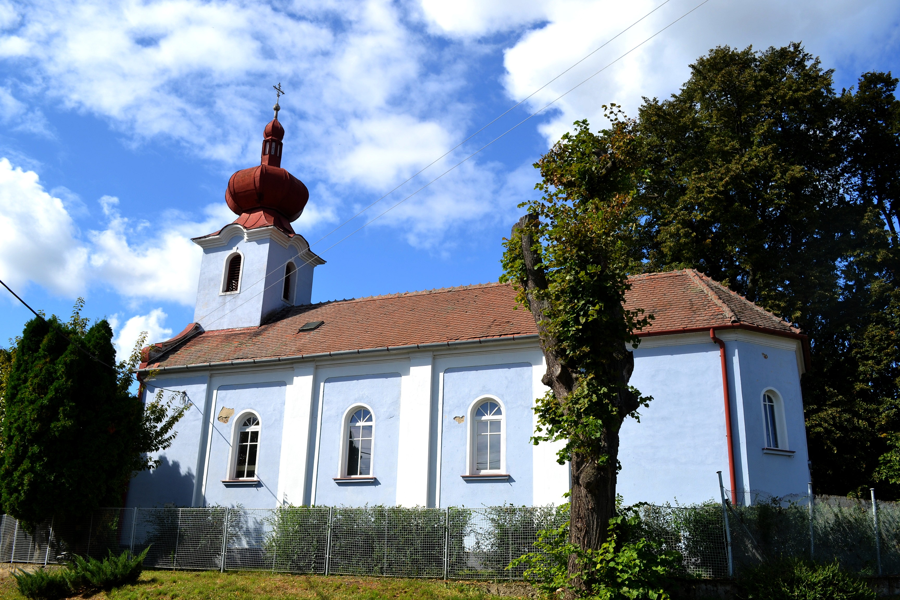 Dolné Otrokovce (okr. Hlohovec), Kostol svätého Michala; celkový pohľad